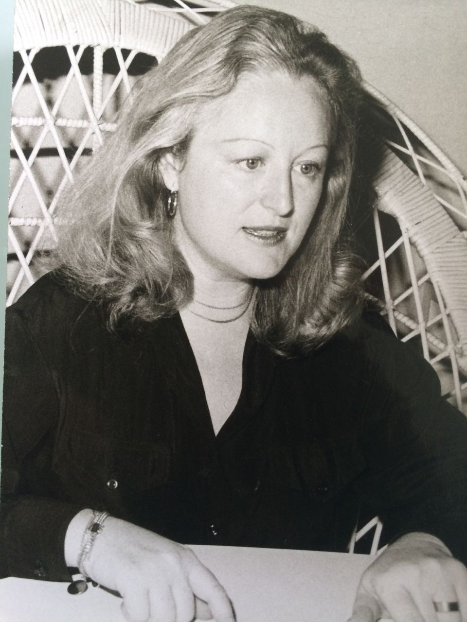 M. Marroco ByN